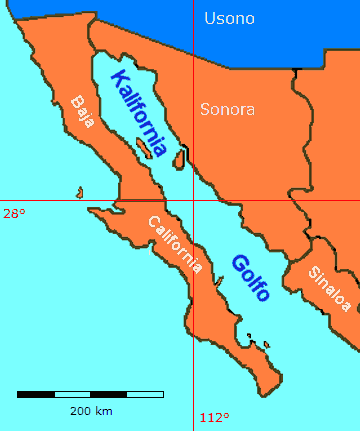 La Kalifornia Golfo. Mapo kreita per GIMP.